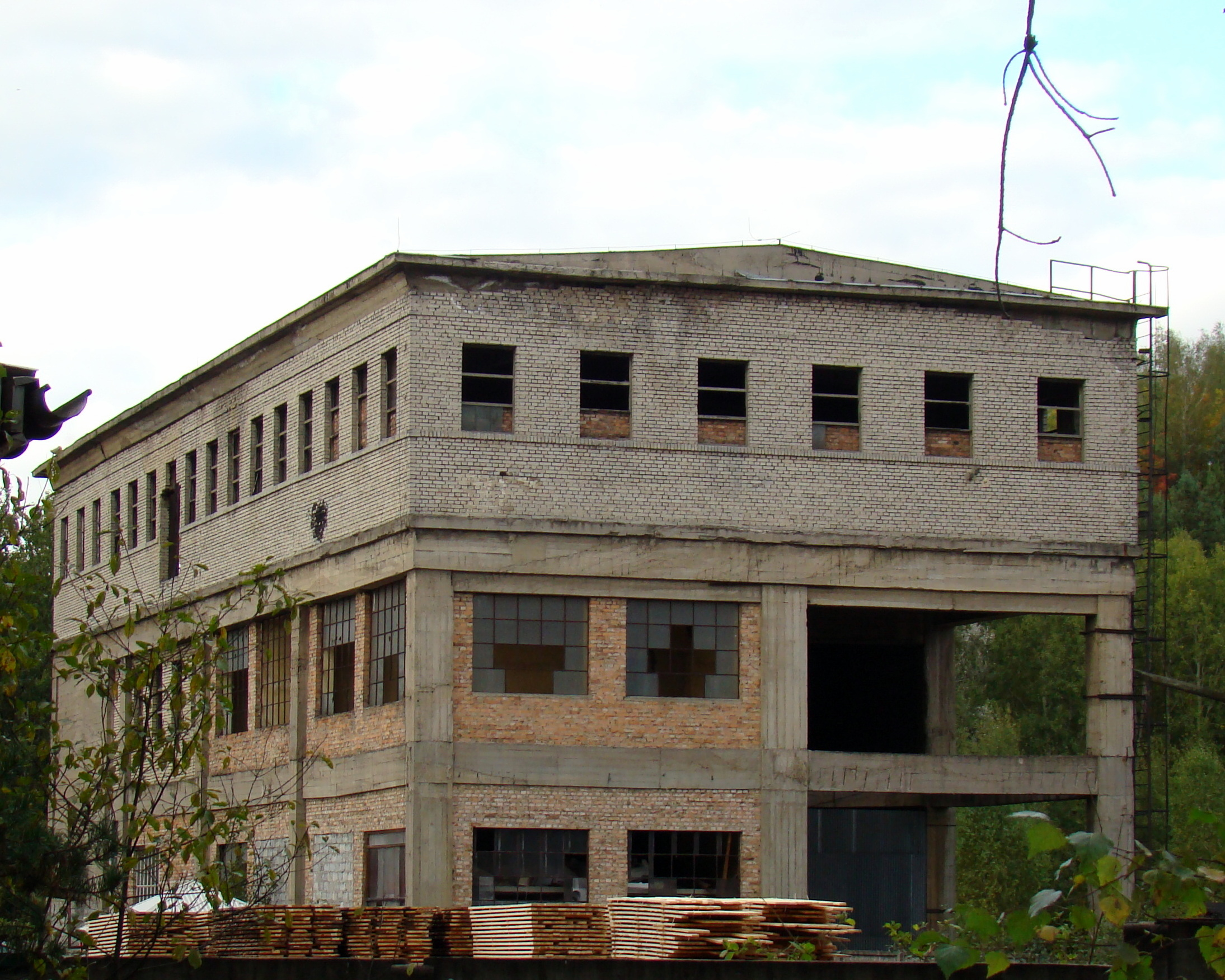 Budynek szybu nieczynnej kopalni rud żelaza "Dębowiec", Dębowiec, gmina Poczesna